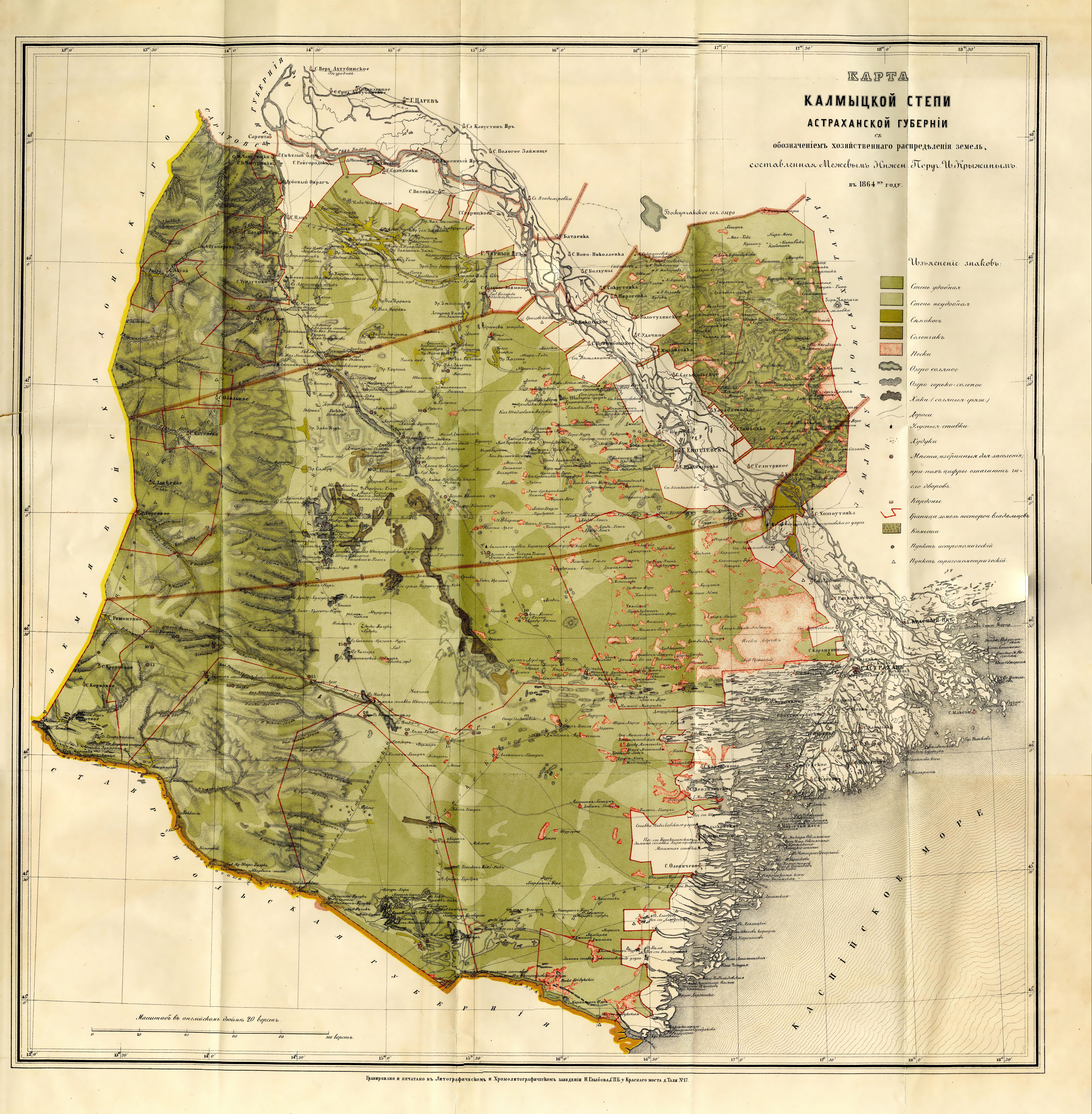 Калмыцкая степь Астраханской губернии (1864)